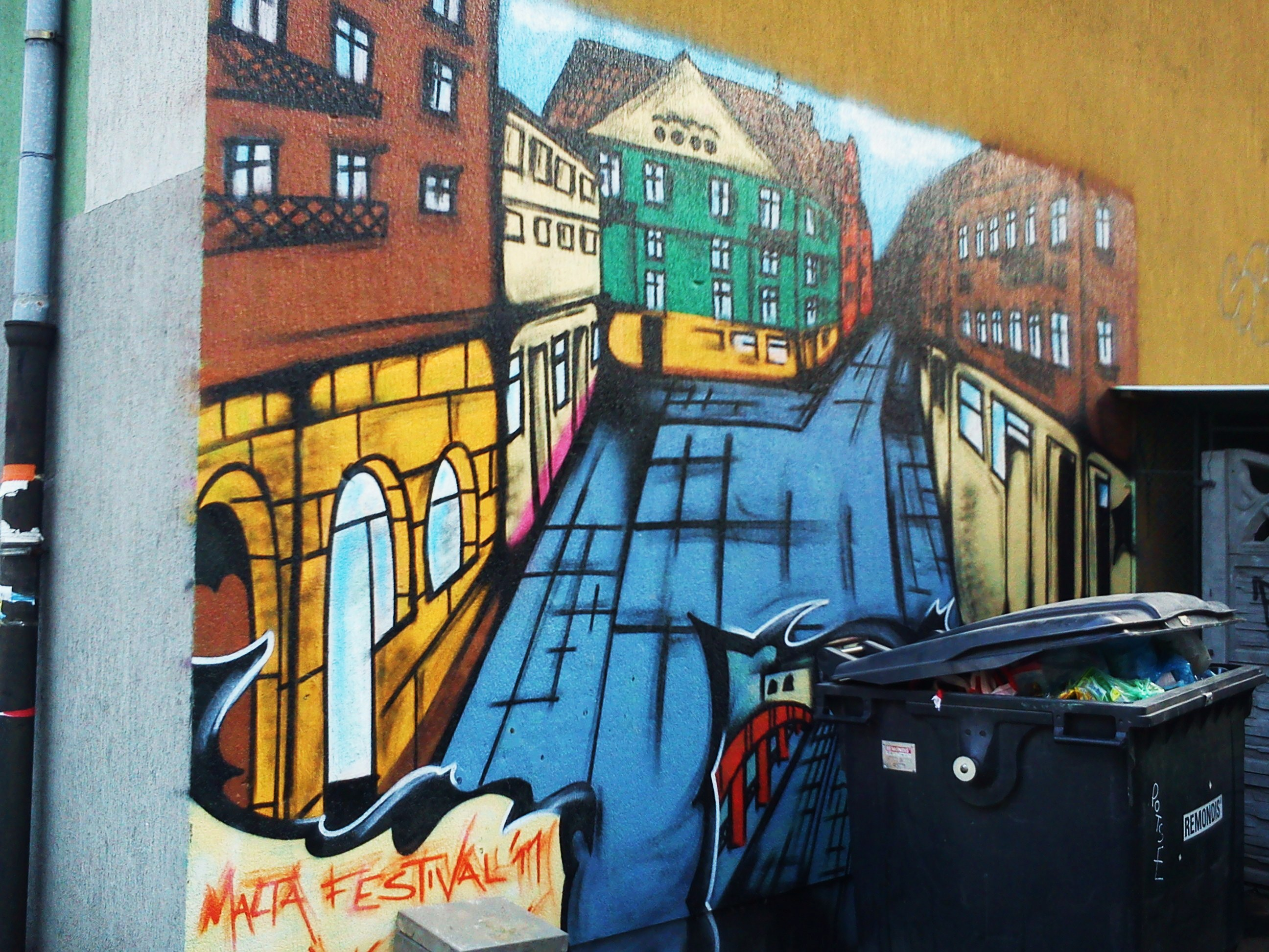 Poznań Śródka/Ostrówek. Graffiti of the district.